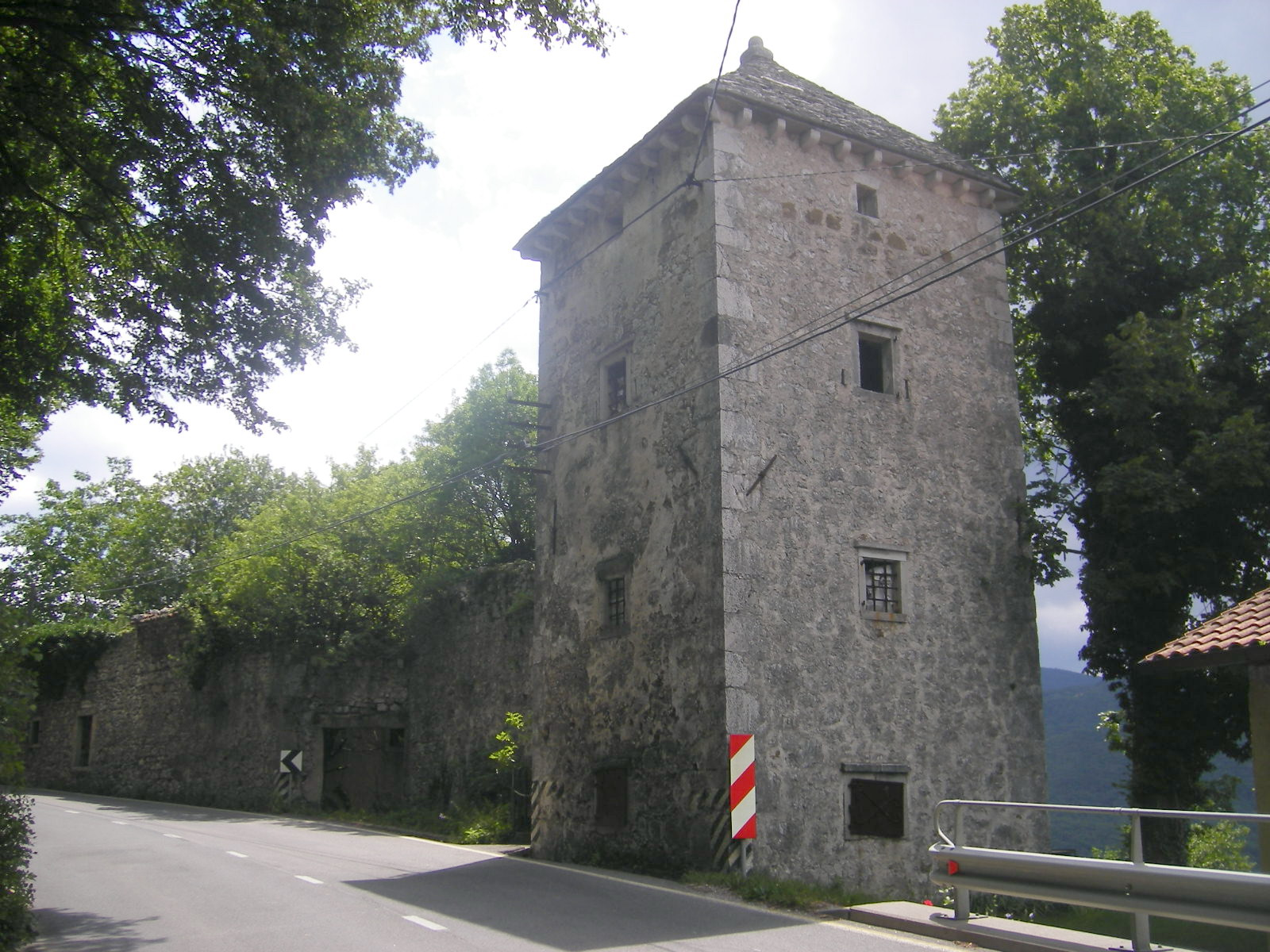 Col (Ajdovščina municipality)